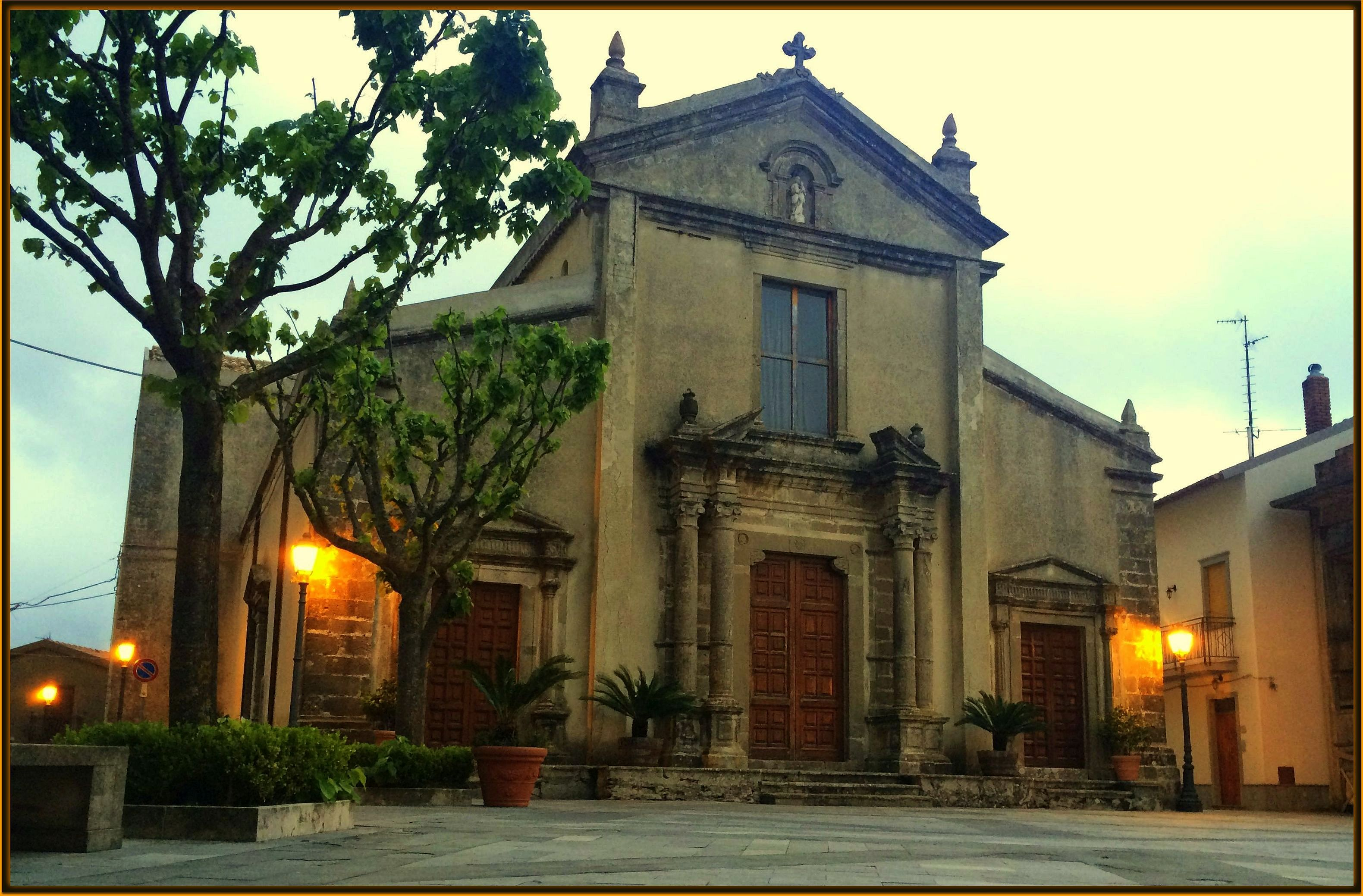 Chiesa Madre in piazza Margherita (Aprile 2016)